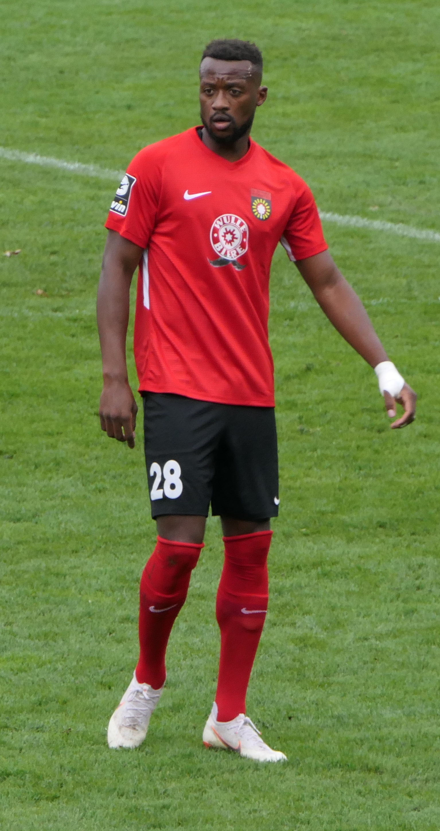 Der Fussballprofi Dimitry Imbongo im Trikot der SG Sonnenhof Großaspach beim Heimspiel gegen Eintracht Braunschweig am 27.10.2019.